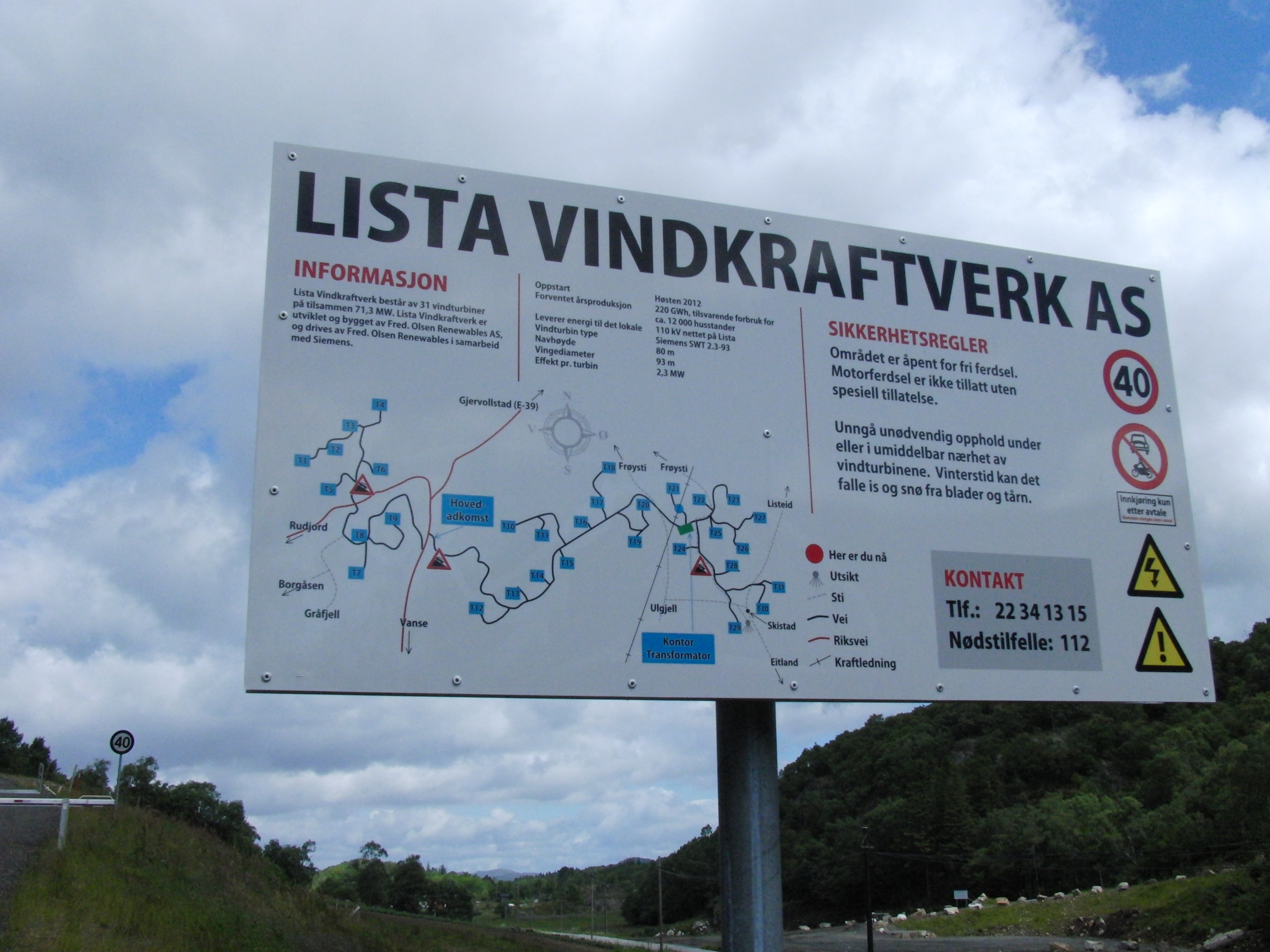 Lista vindkraftverk